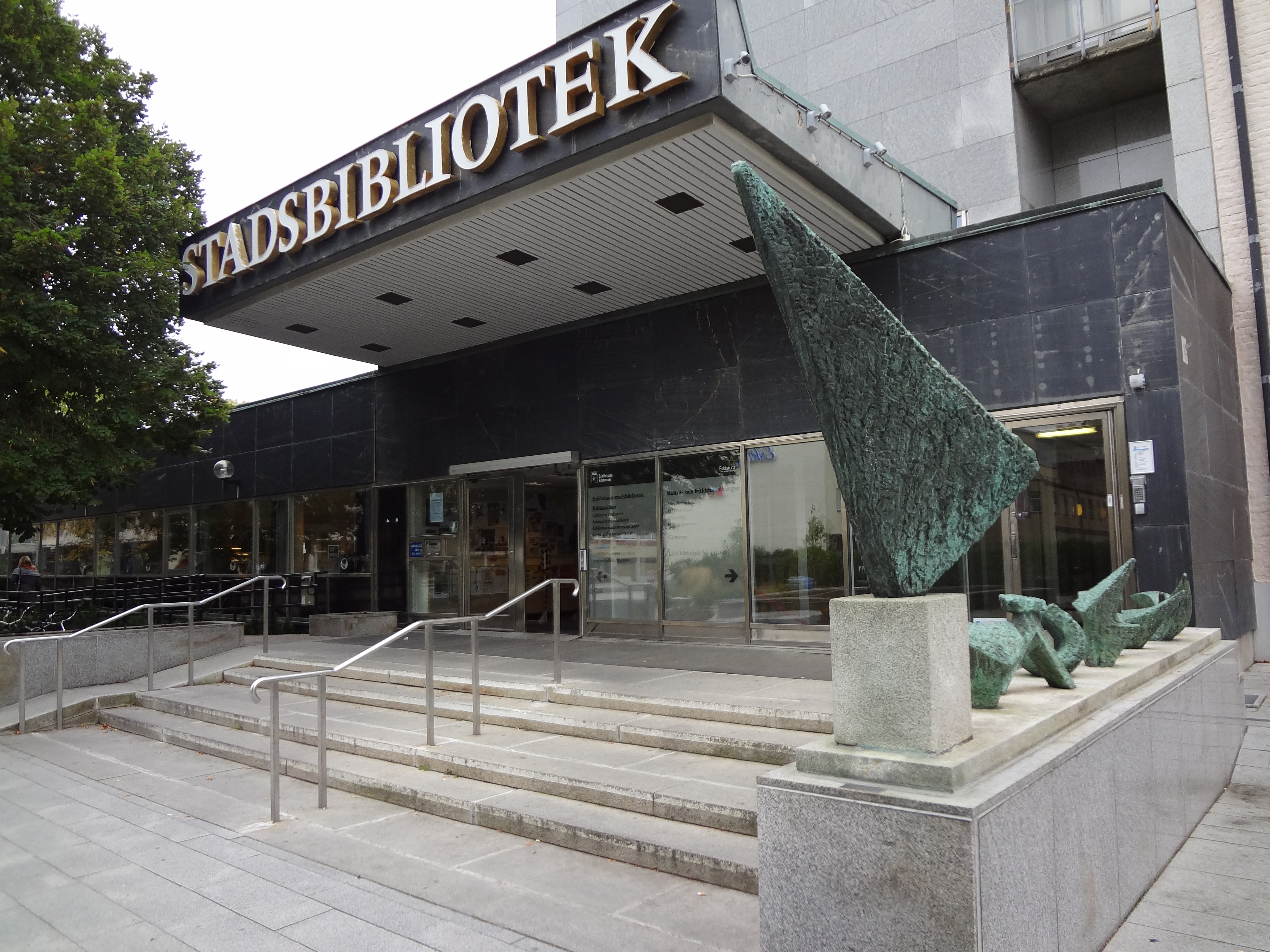 Skulpturen "TEXT", av Bengt Amundin 1965 på trappen till Eskilstuna stadsbibliotek. Text på skylt: "Bengt Amundin, 1915-2011, TEXT, Brons, Uppsatt 1965"